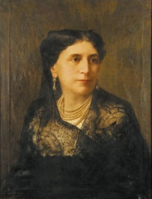 Portret Antoniny ze Skórzewskich Łąckiej (1832-1905)